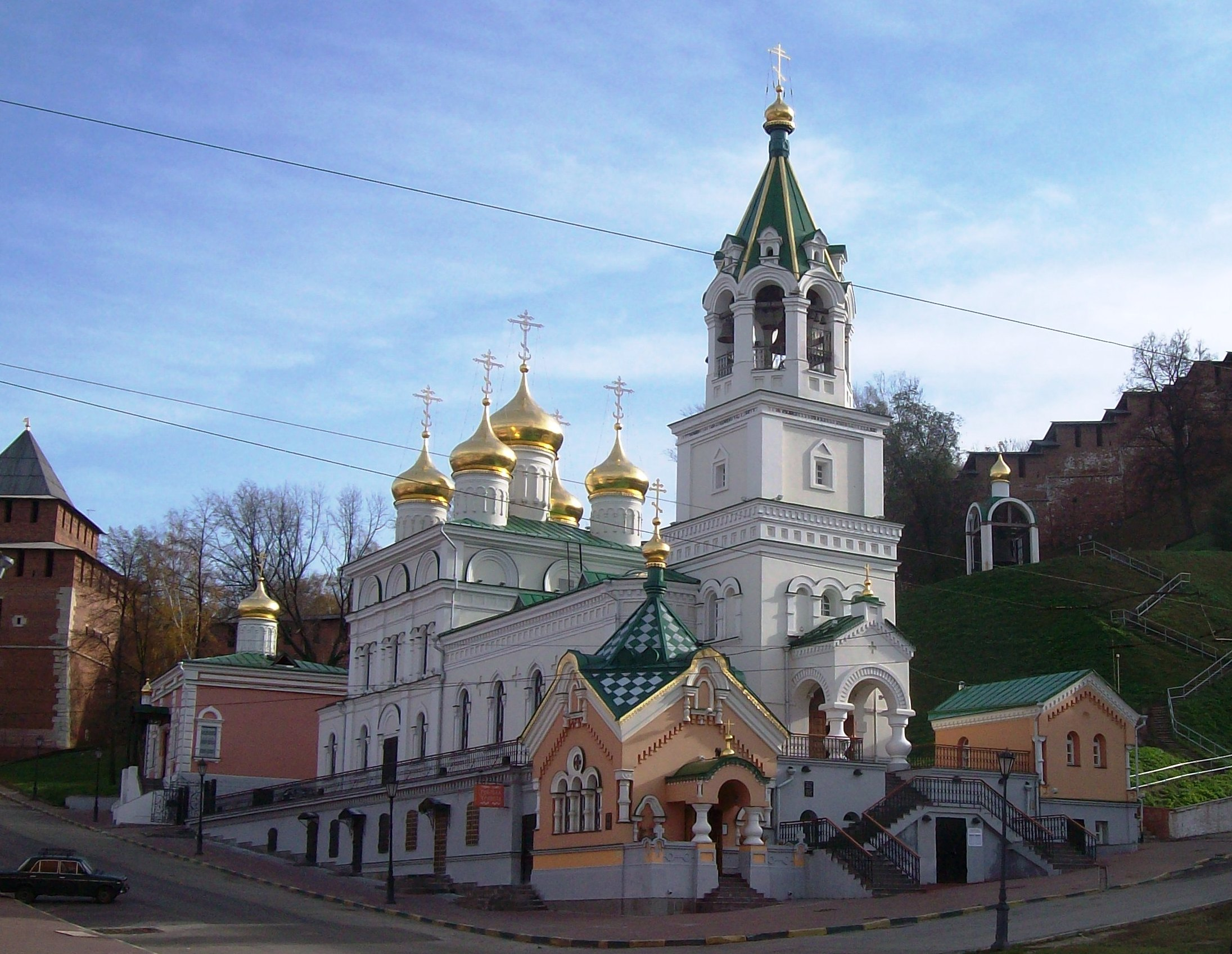 Церковь Рождества Иоанна Предтечи (Нижегородская область, Нижний Новгород, Ивановский съезд, 1Б)